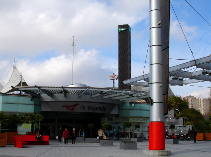 Centro commerciale La Vaguada a Madrid